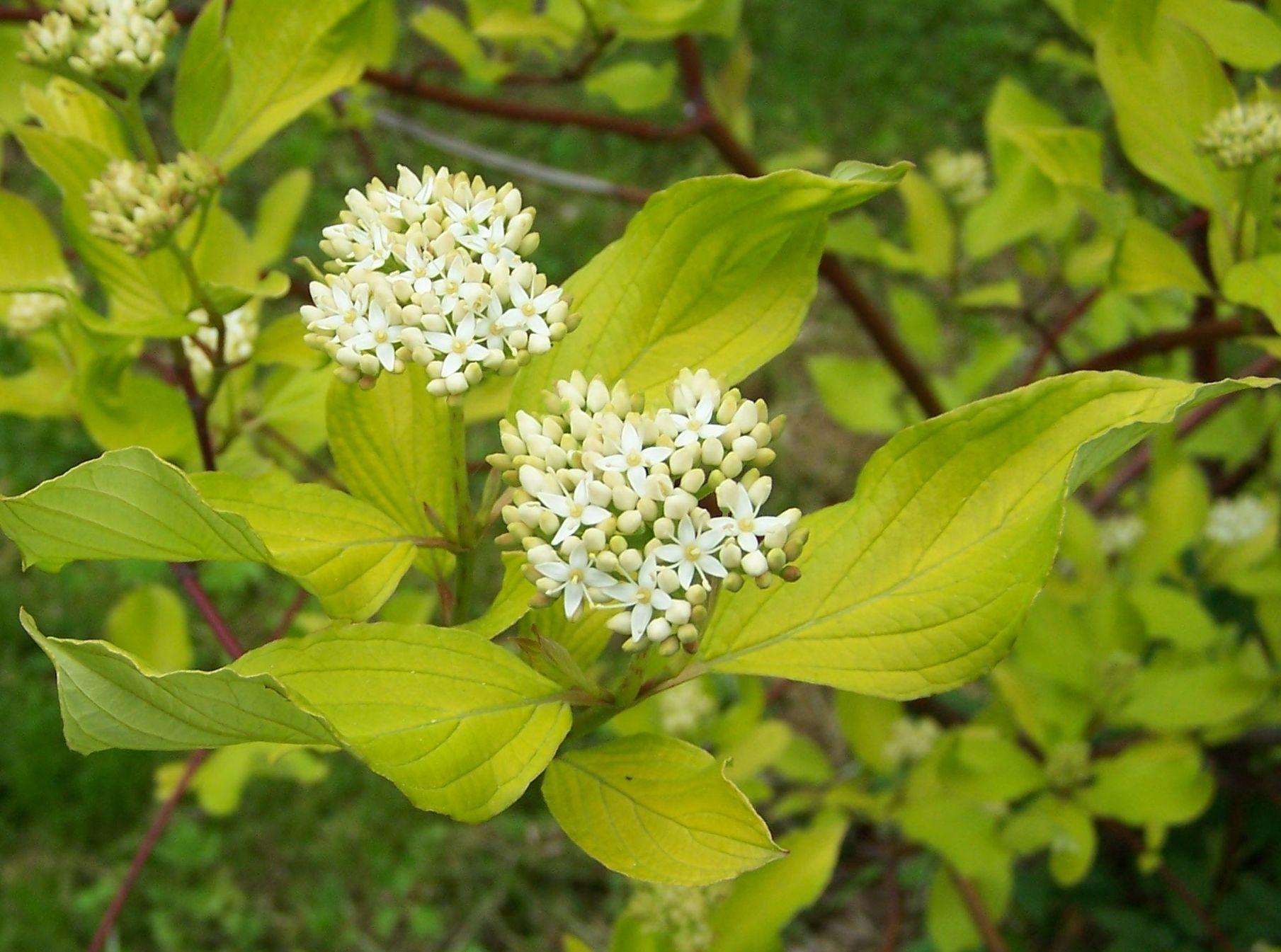 Cornus alba (pl. dereń biały, odmiana ozdobna)